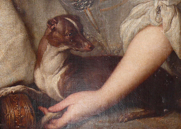 détail